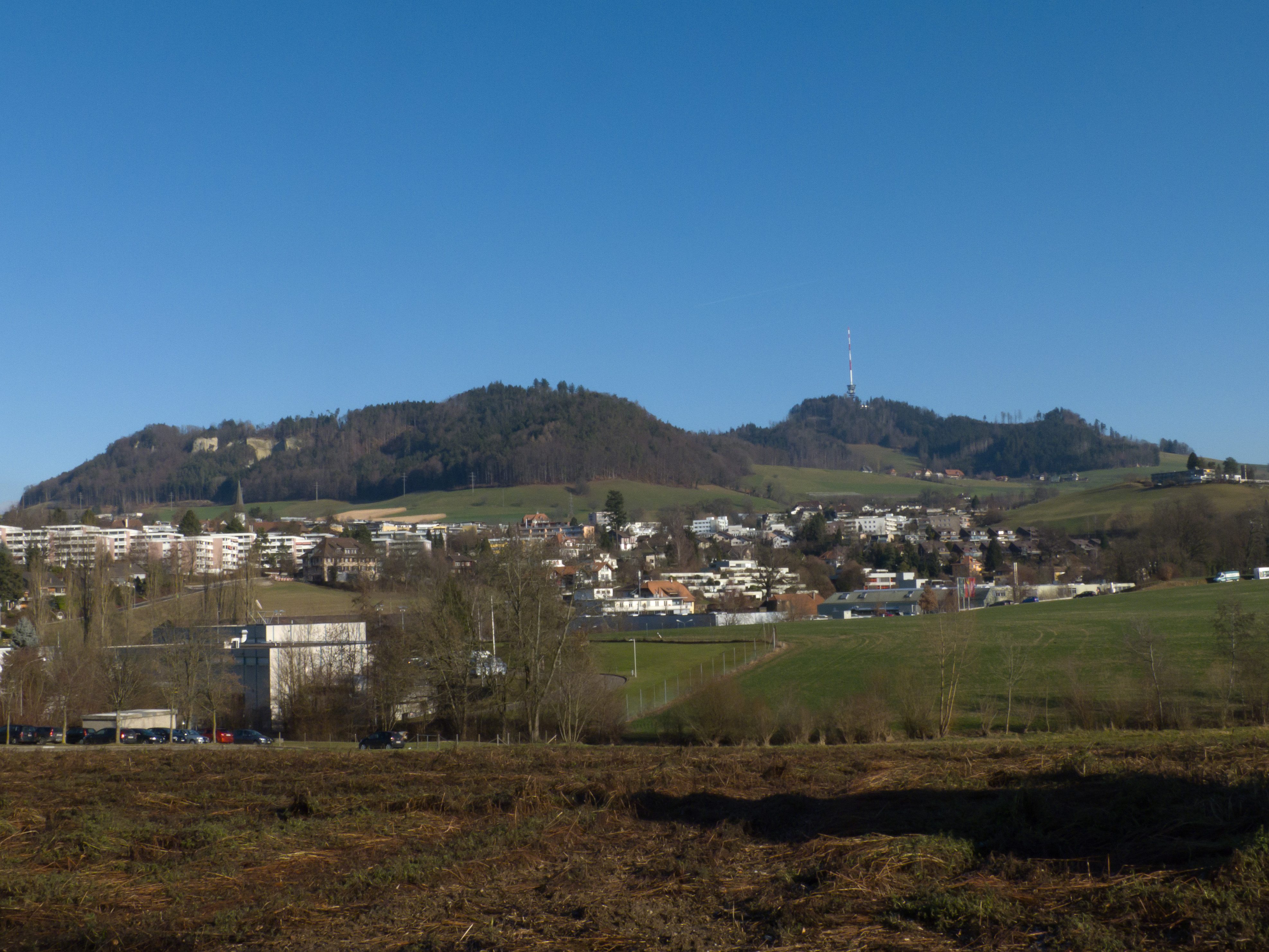 Der Bantiger, Berg mit Dorf Bolligen